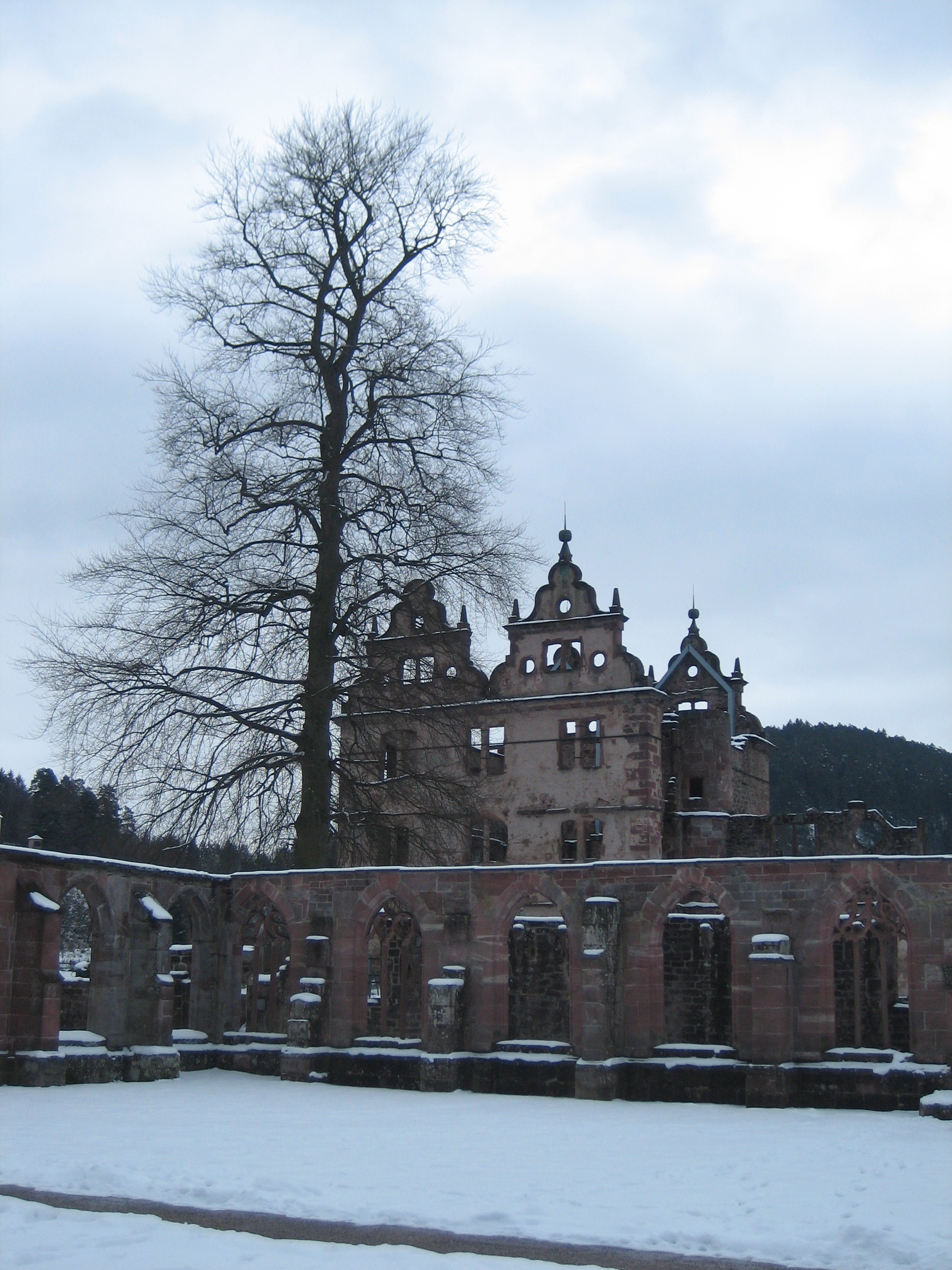 Kloster Hirsau: Kreuzgang im Winter 09